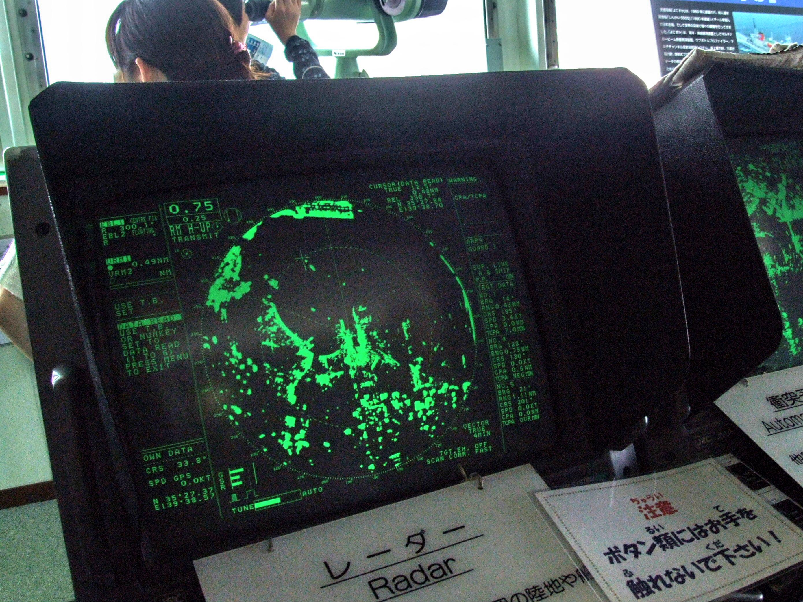 潜水調査船よこすかの水上レーダー（横浜港開港150年の潜水調査船よこすかの船内開放での撮影）